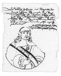 Effigie di Daniel Czepko con manoscritto